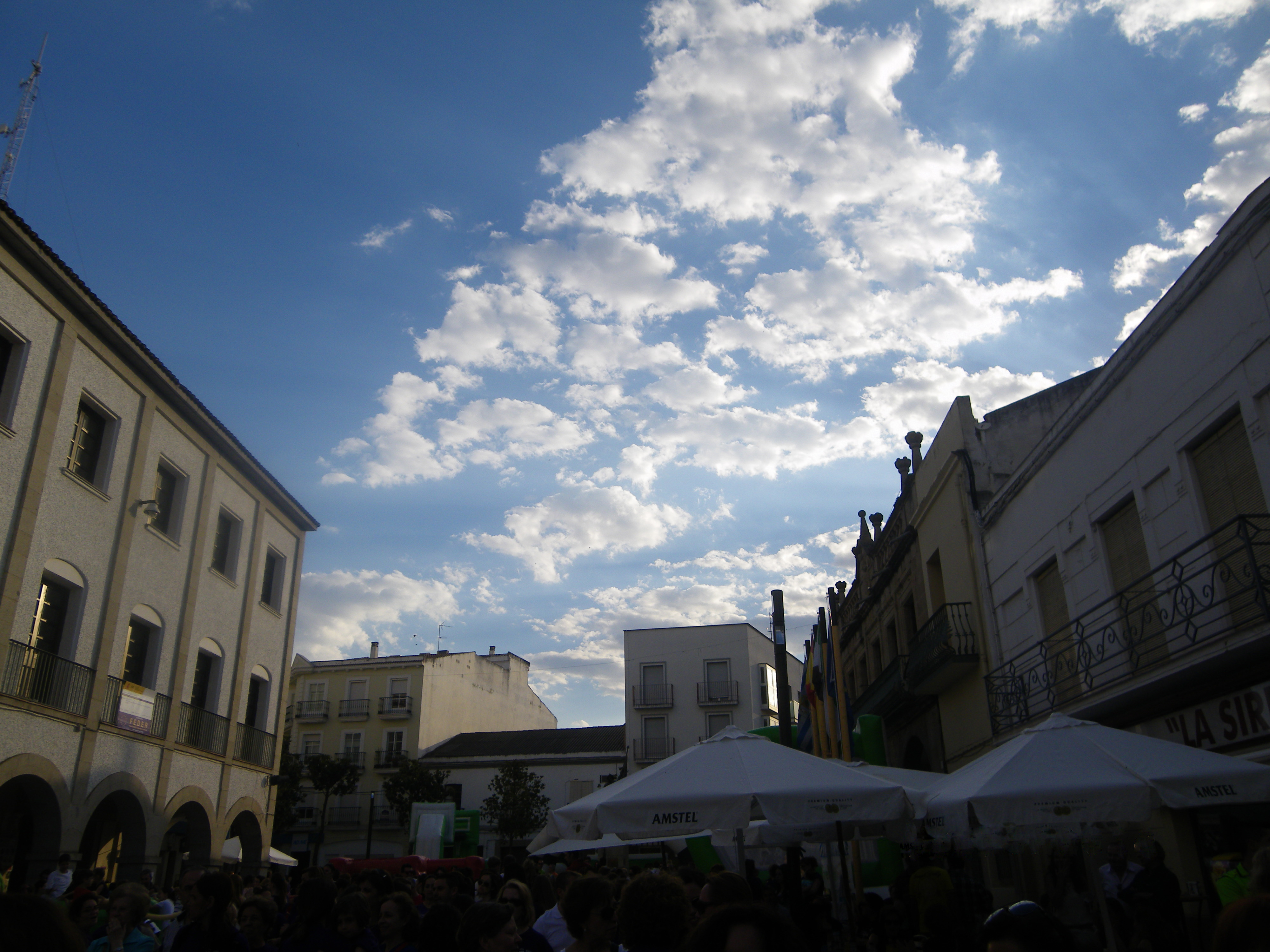 Villanueva de la Serena, provincia de Badajoz, Extremadura, España.